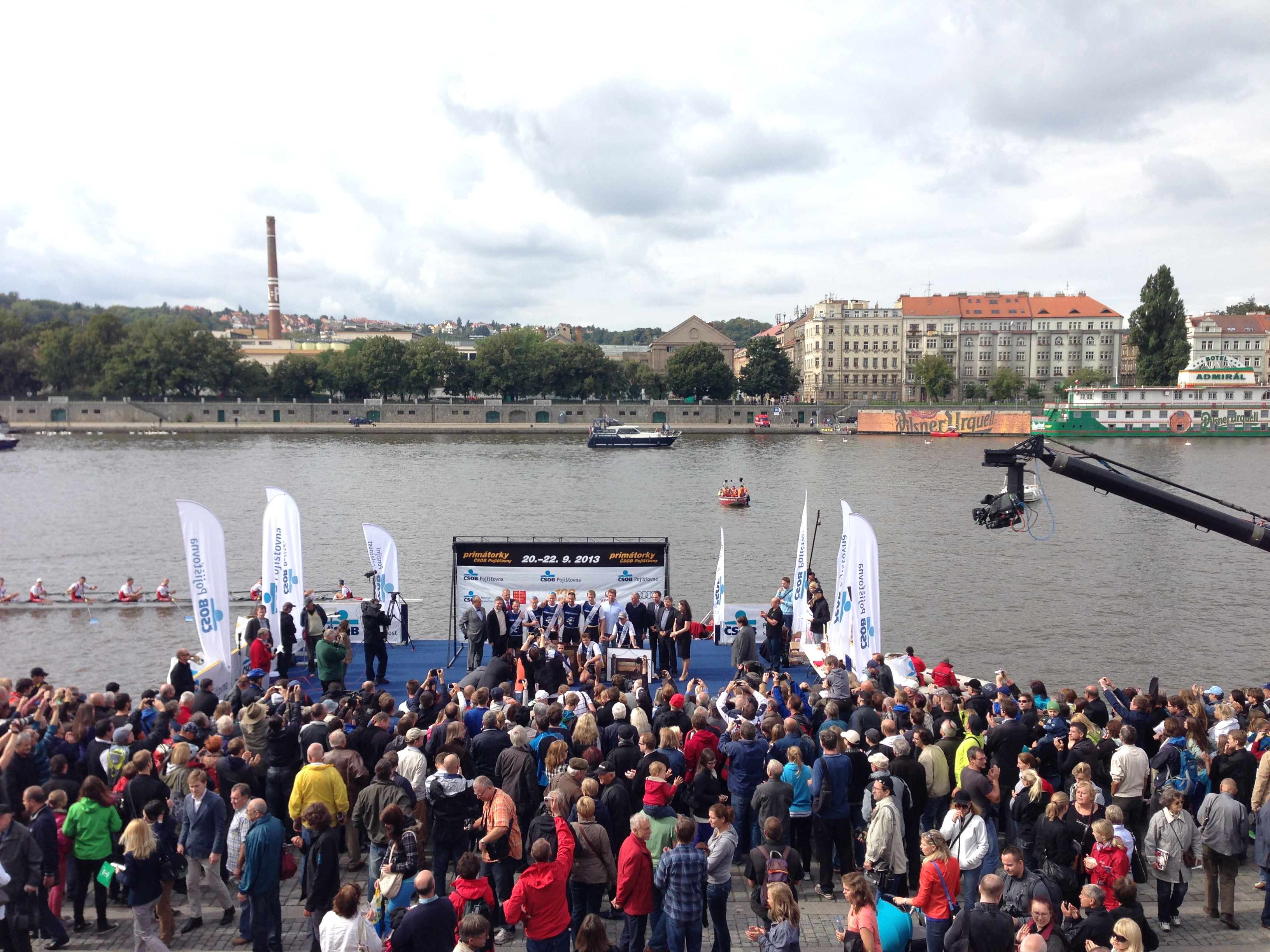 Vítězové jubilejních 100. Primátorek 2013